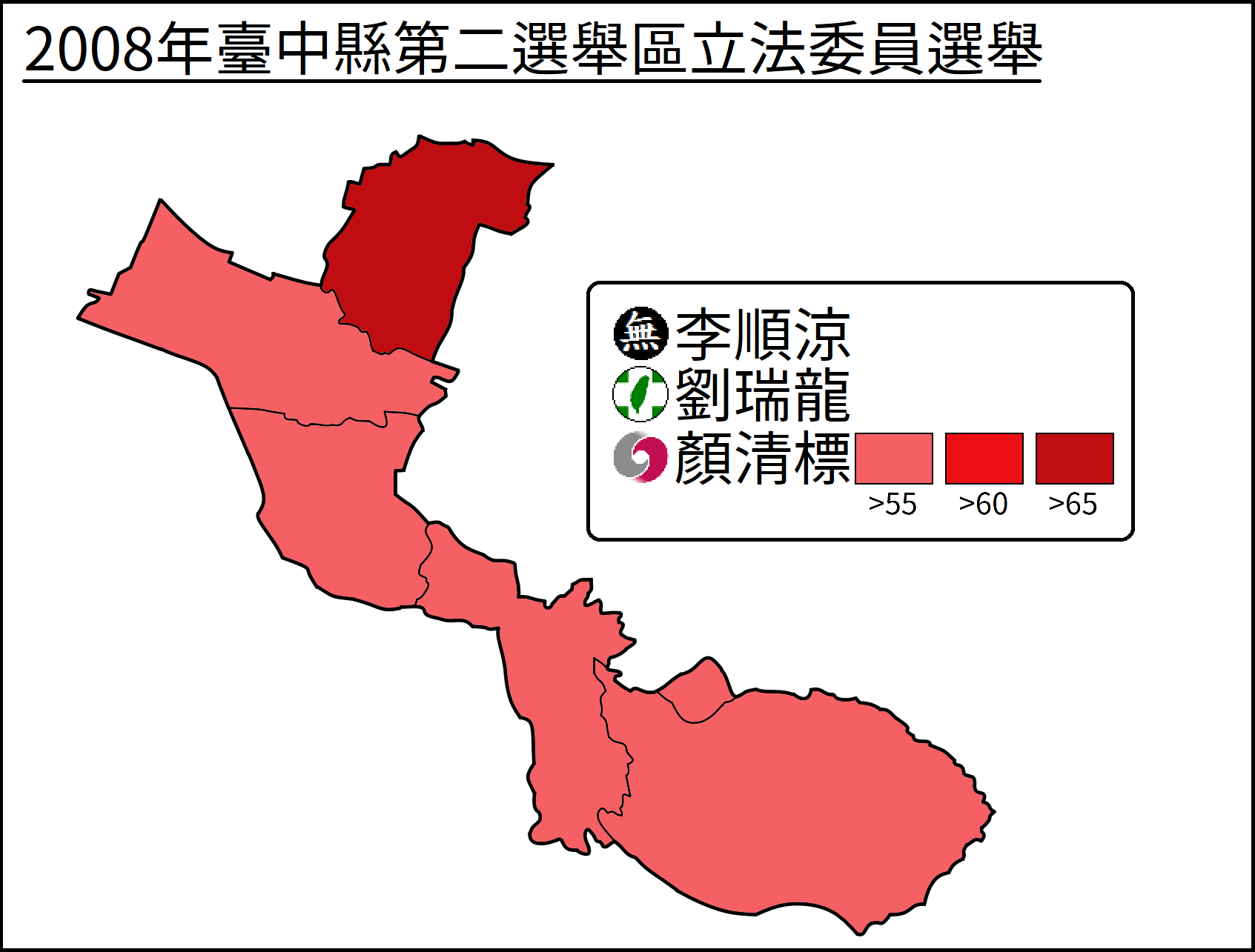 2008年立法委員選舉臺中縣第二選舉區